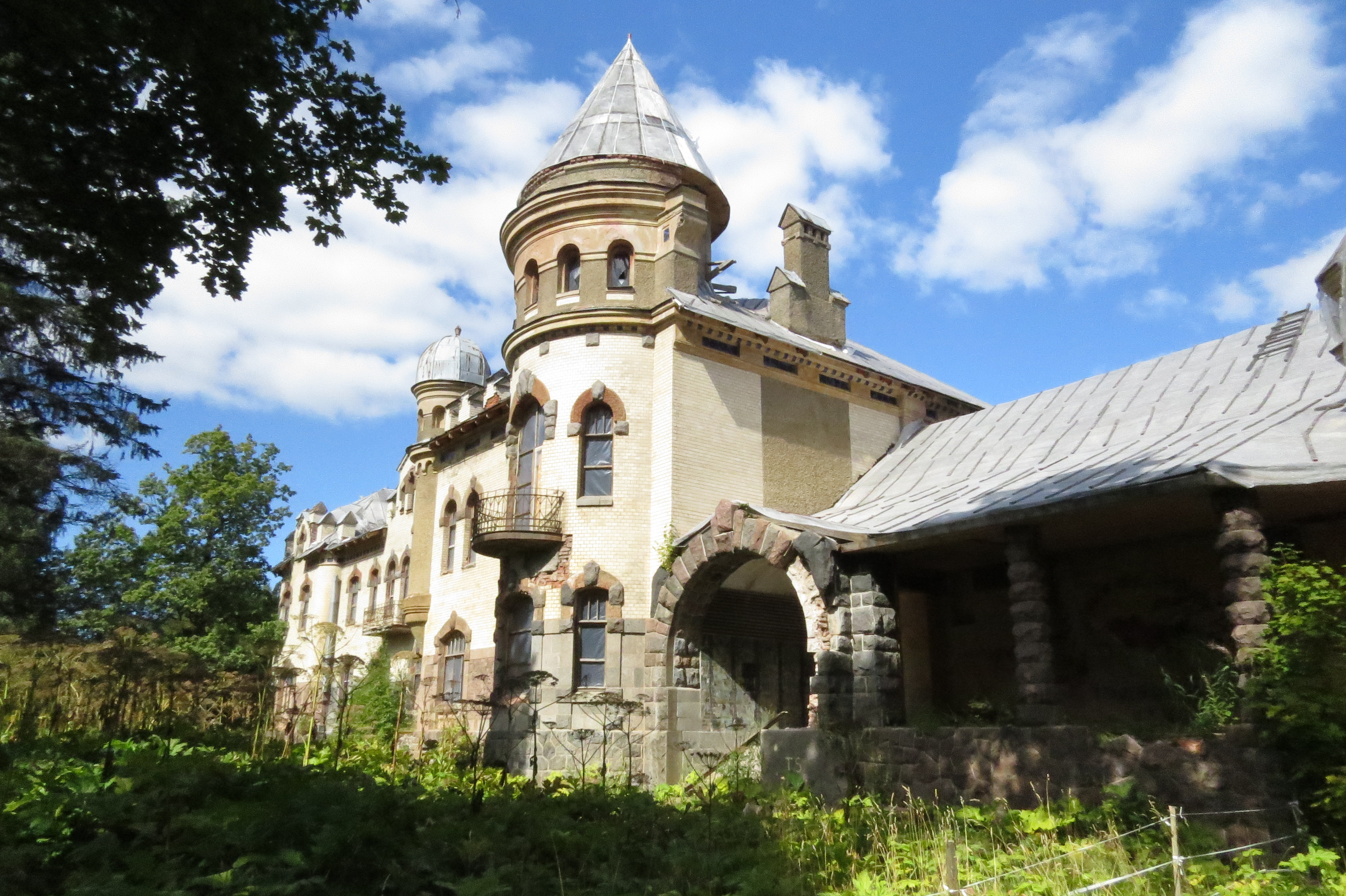 Дом: Белогорка, Гатчинский район, Ленинградская область